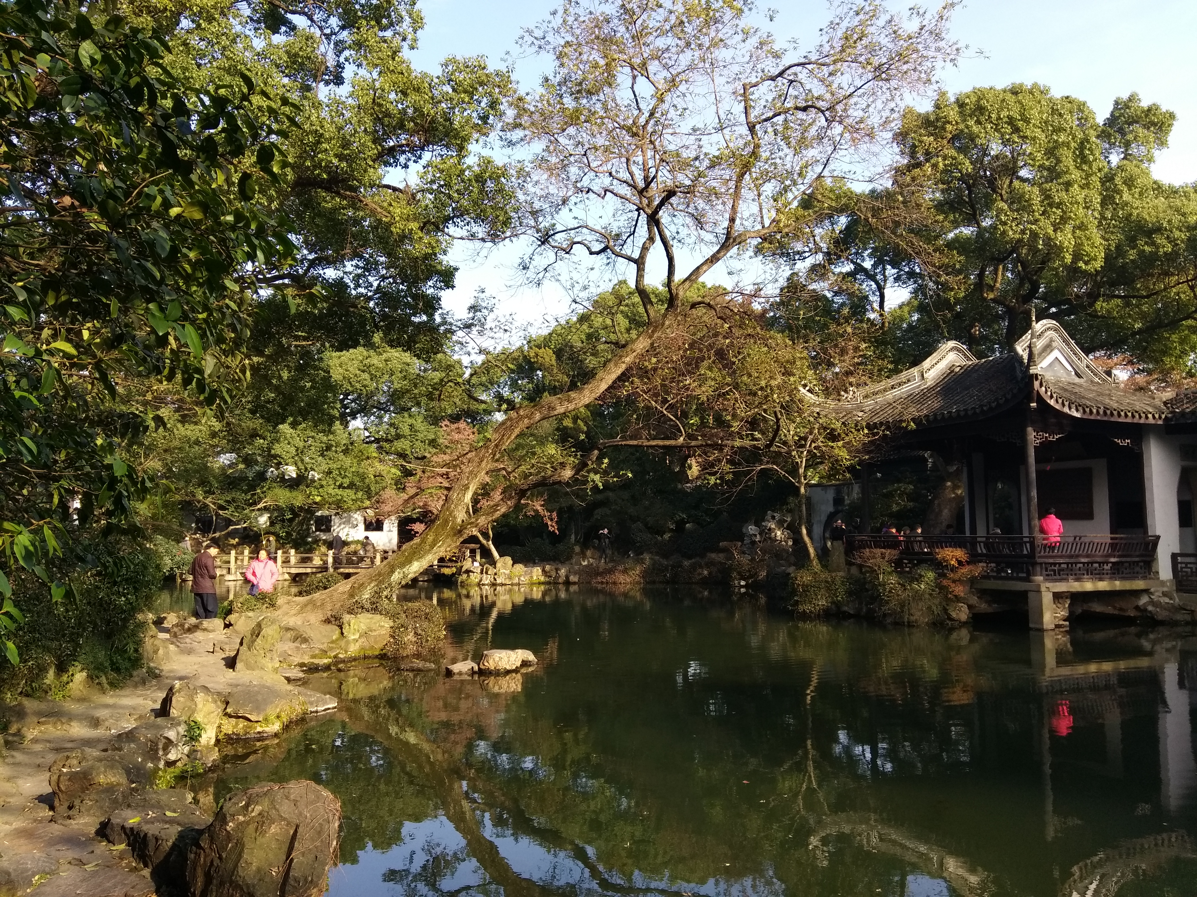 中文（中国大陆）: 寄畅园中心